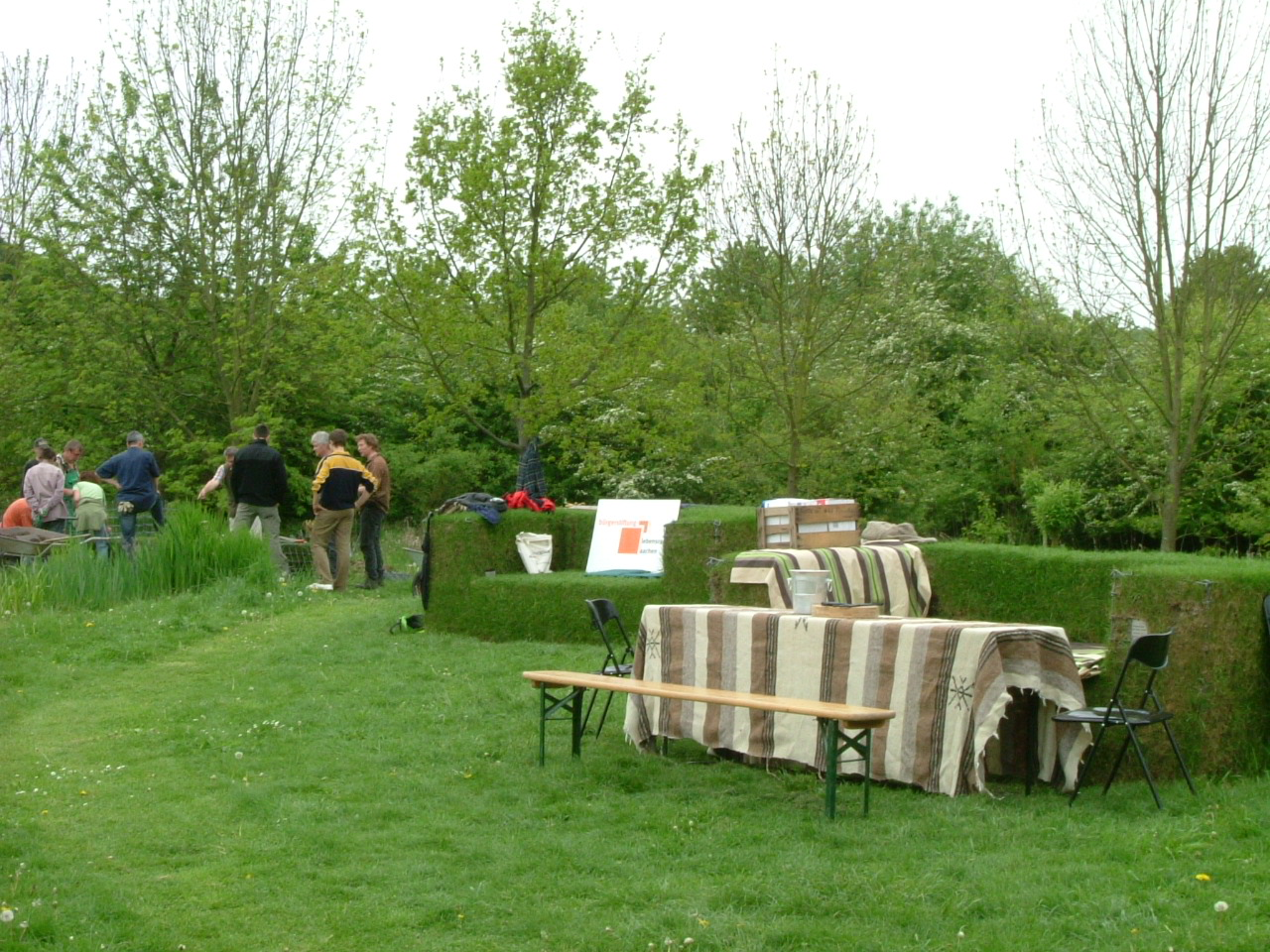 Grassofas im Rabental bei Gut Melaten in Benutzung